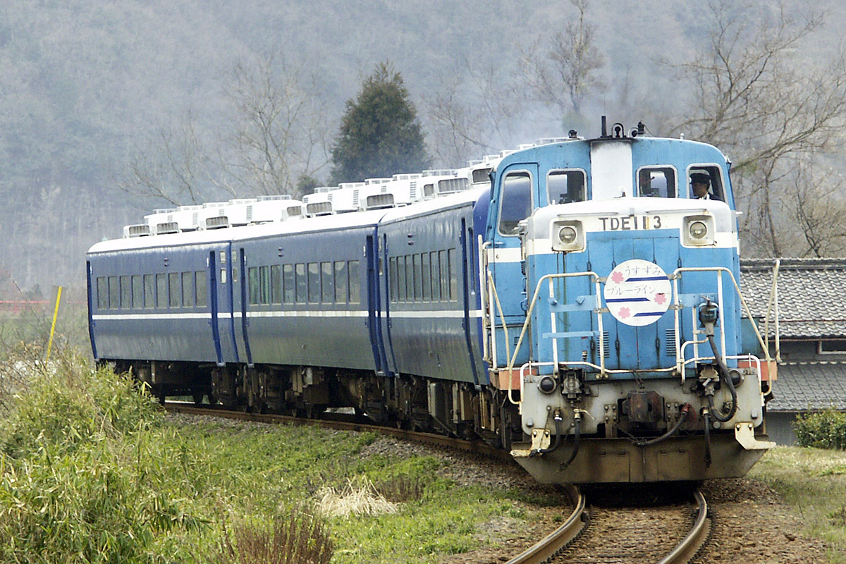 谷汲口駅にて